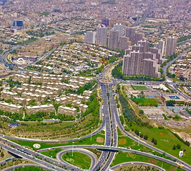 Shahrak-e Gharb